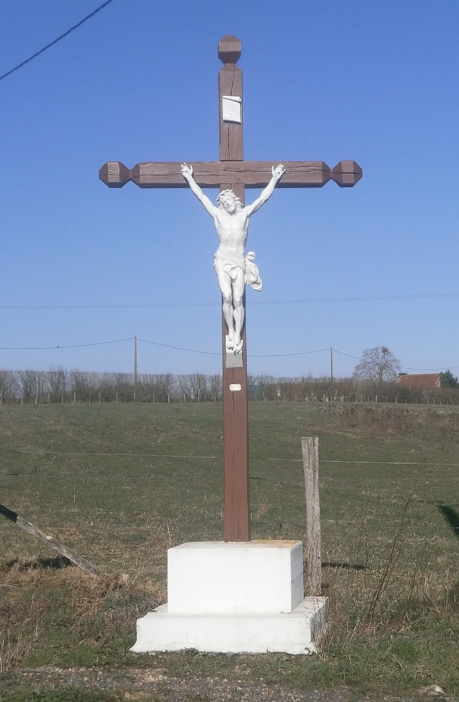 La croix du Chêne Drelin à Loché-sur-Indrois